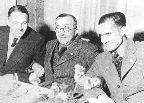 Хейнкель и пилоты его фирмы